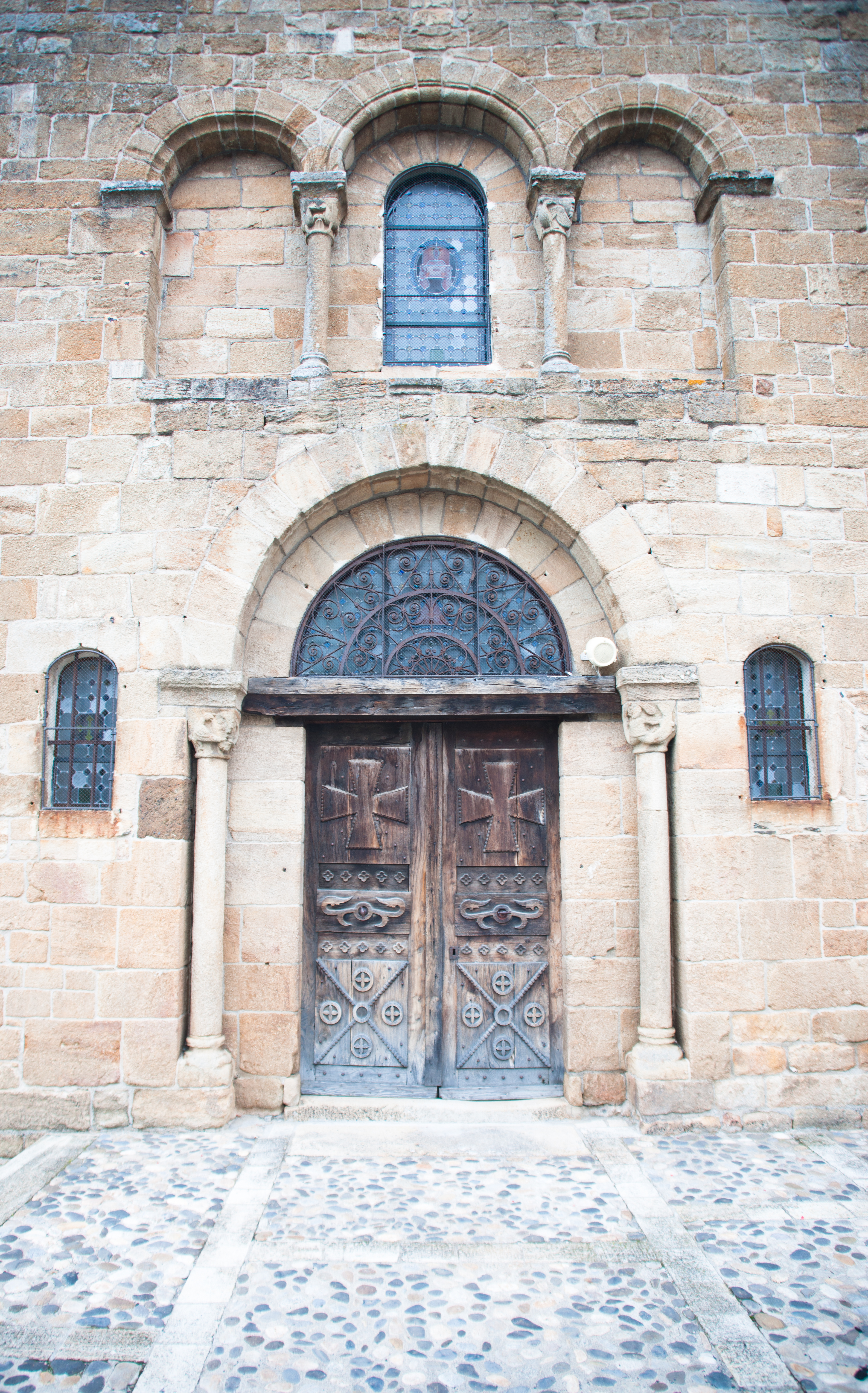 Église Saint-Étienne de Saint-Étienne-Lardeyrol - entrée